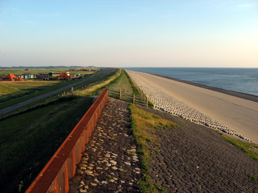 Grens van Hondsbossche en Pettemer Zeewering